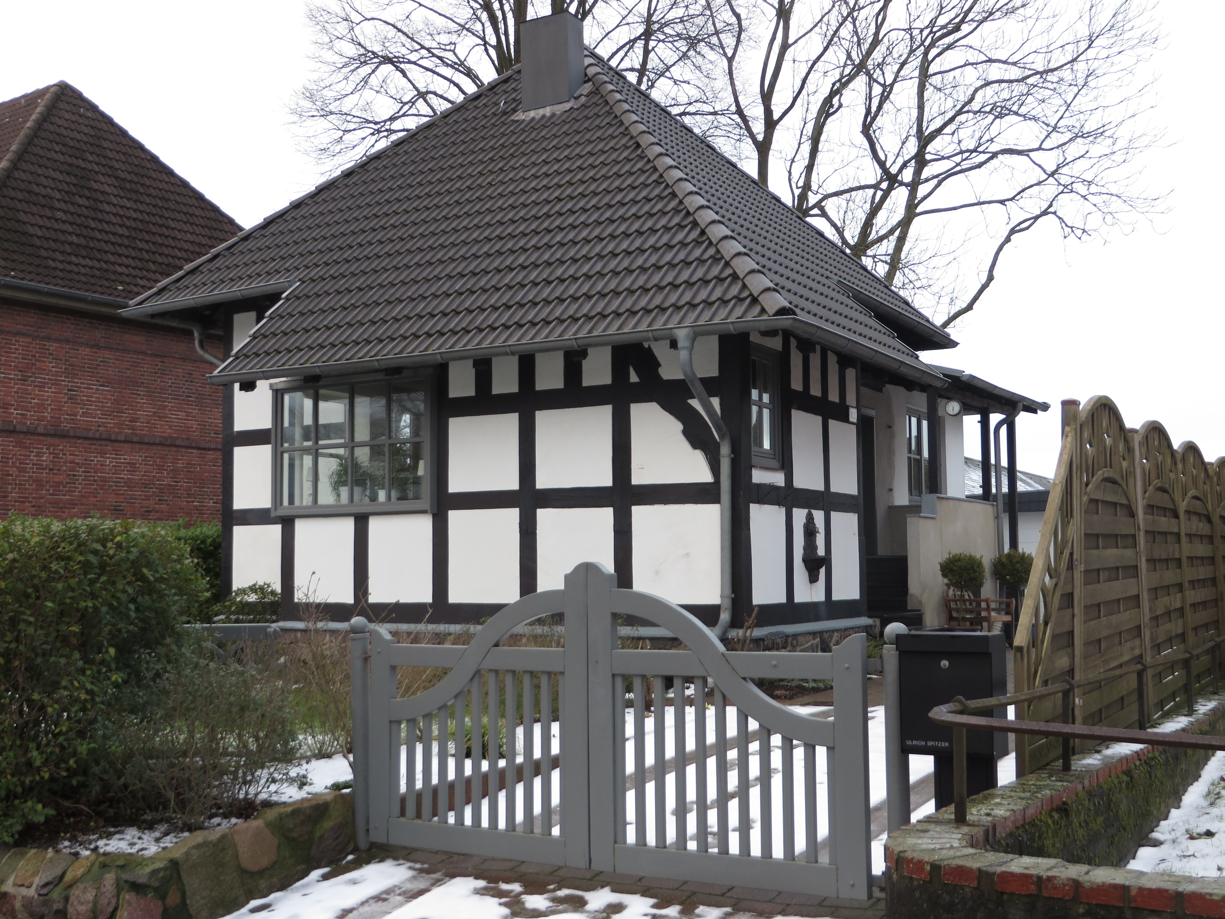 Funk- und Telegraphenhaus der Torpedostation, Swinemünder Straße 12 (Mürwik 2015), Bild 01